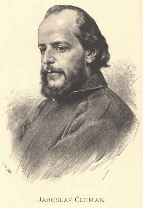 Portréty předních osobností od Jana Vilímka